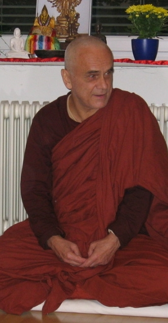 Bhikkhu Kusalananda Photograph taken by Gakuro Sept. 2005